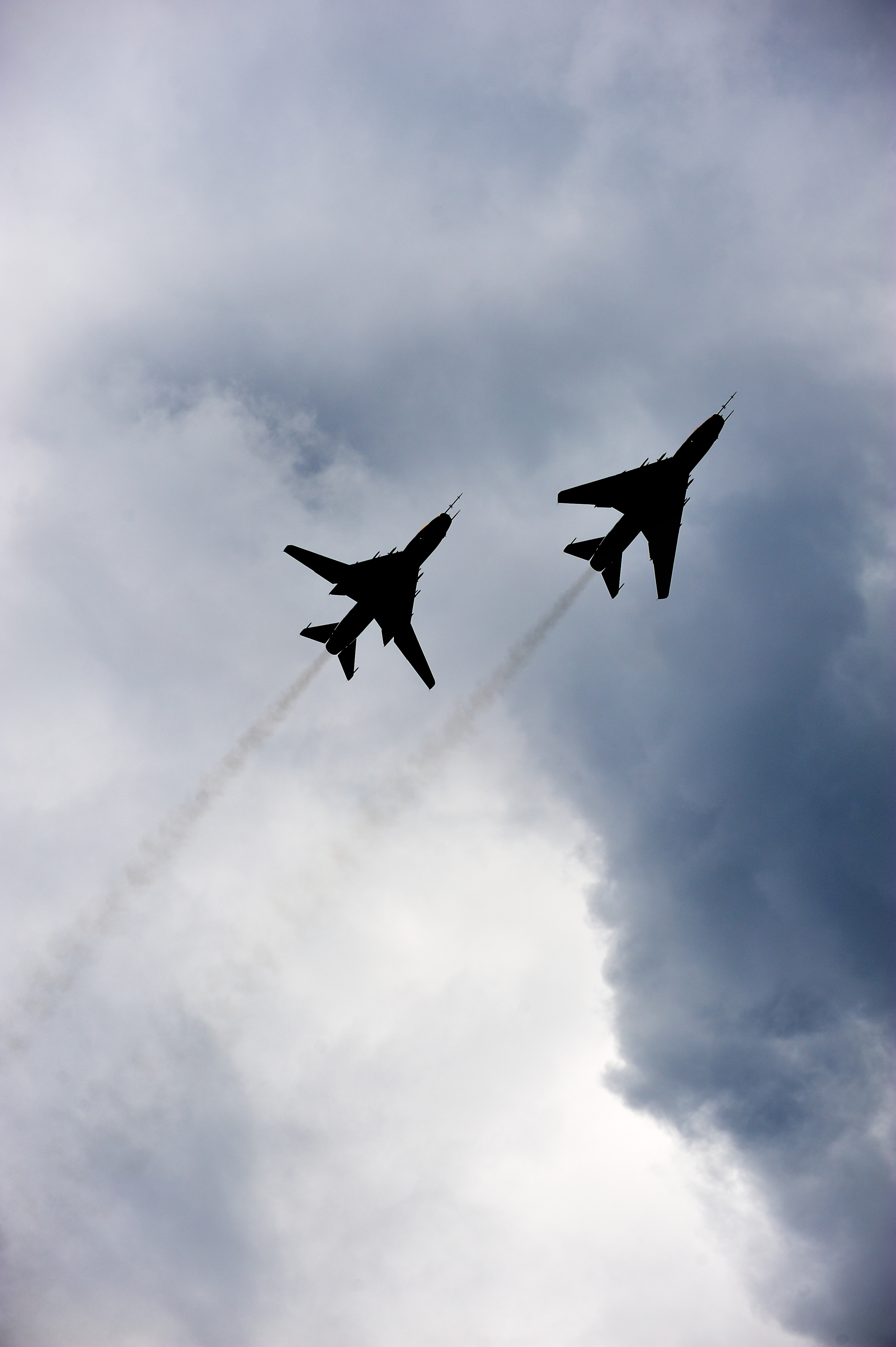 Święto 23. Bazy Lotnictwa Taktycznego w Mińsku Mazowieckim